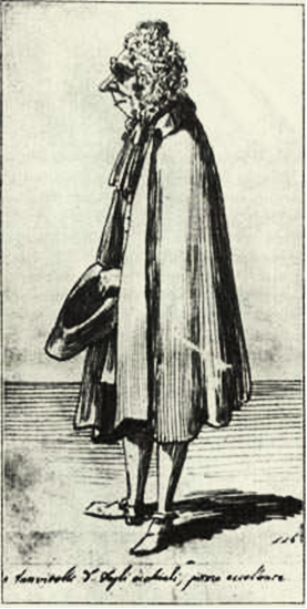 Caricatura veneciana del pintor Gaspar van Wittel (Gasapare degli Occhiali)